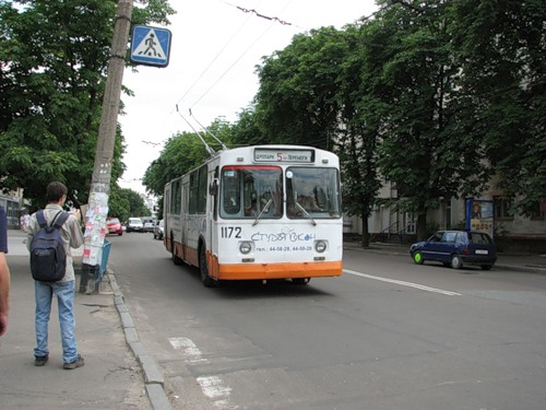 Житомирский троллейбус